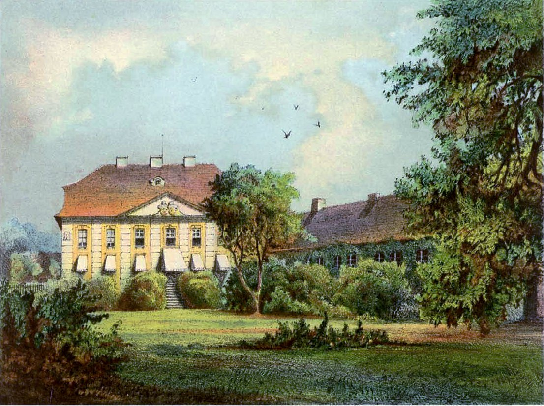 Gut Plessow, Kreis Zauche-Belzig, Provinz Brandenburg